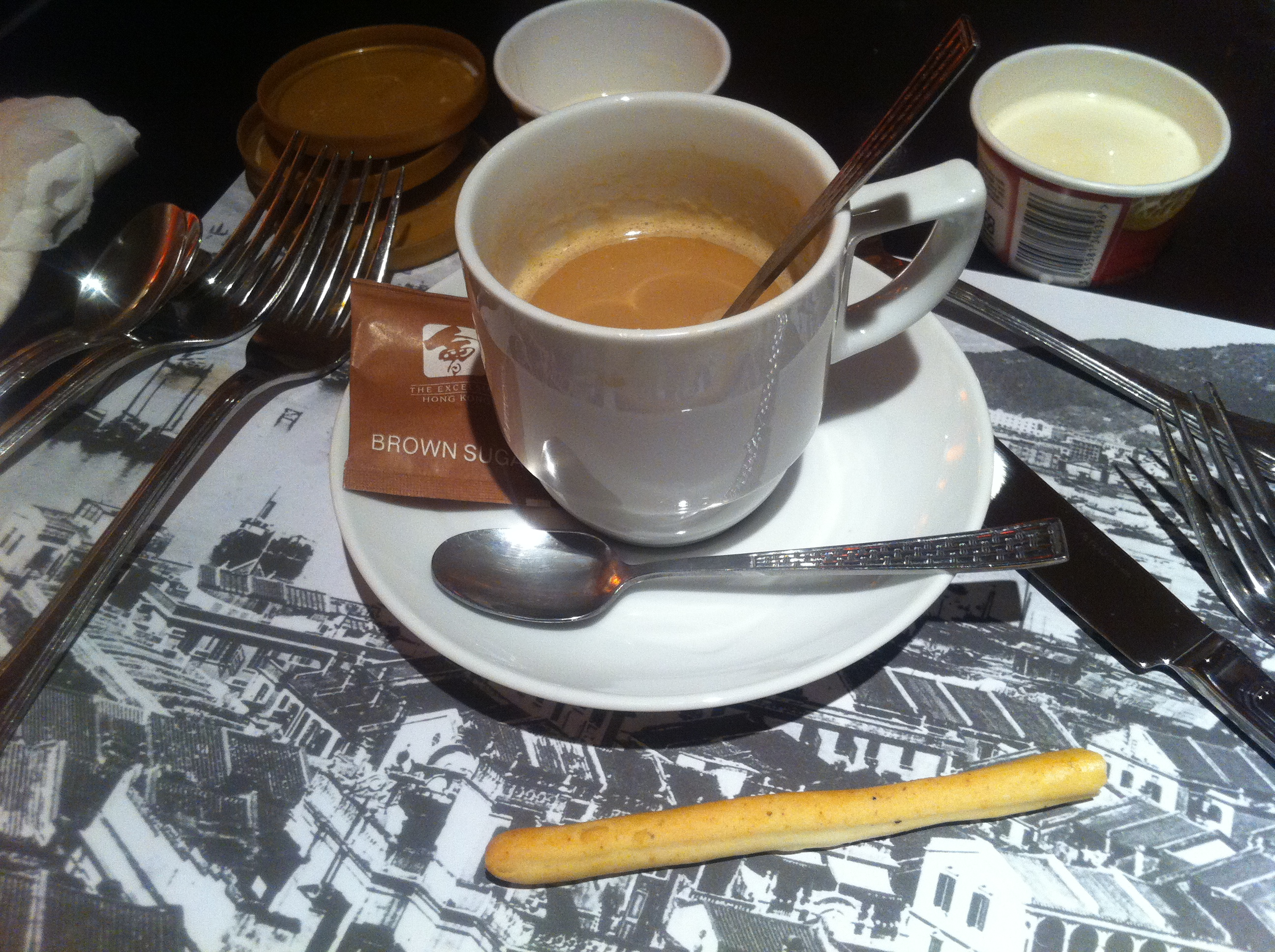 中文（香港）: 香港怡東酒店 自助餐 咖啡